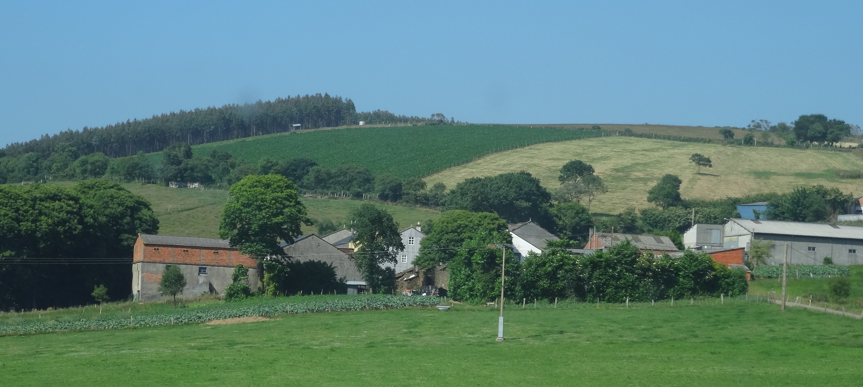 Ver título.